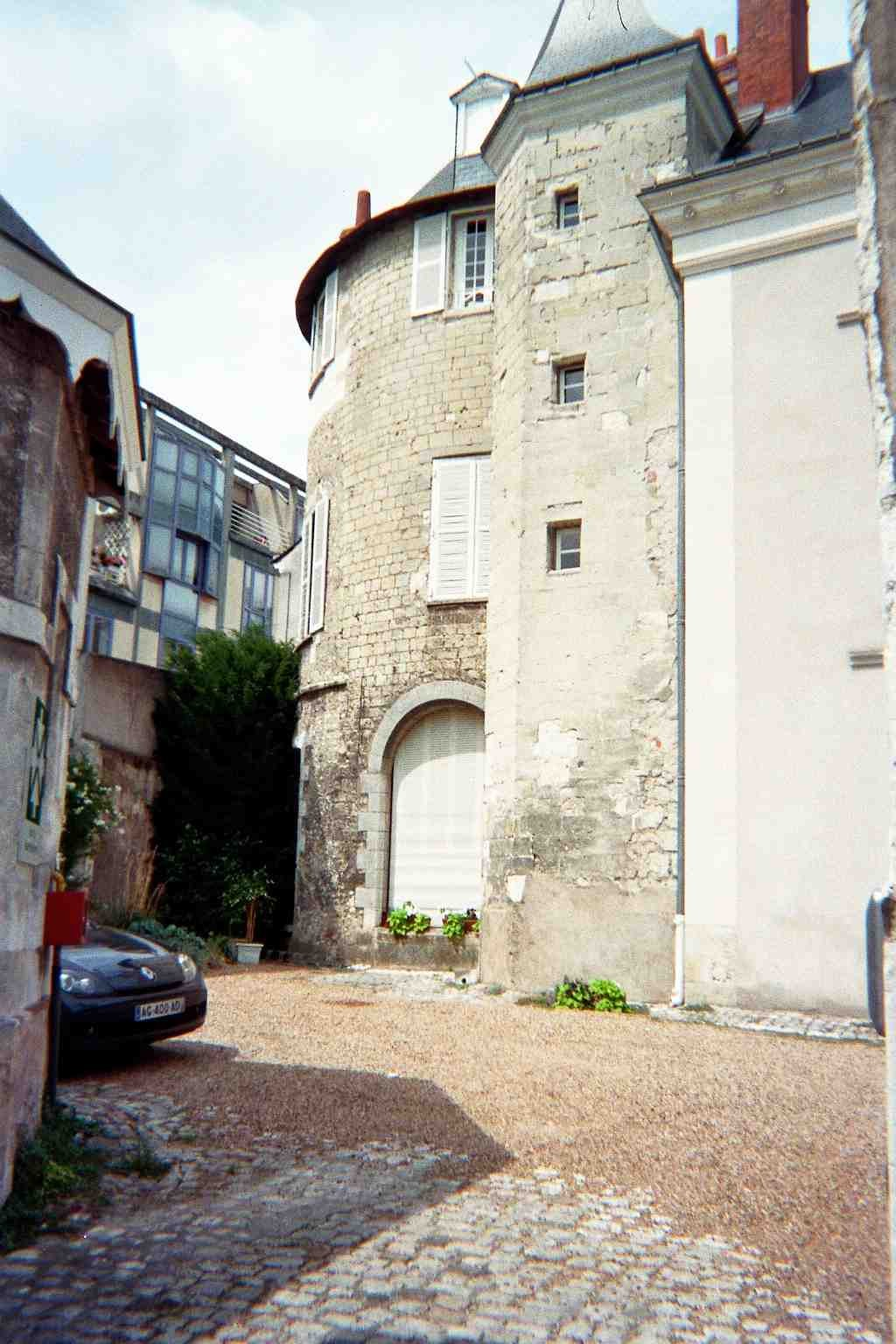 tour d'enceinte de la Martinopole de Tours (remaniée)